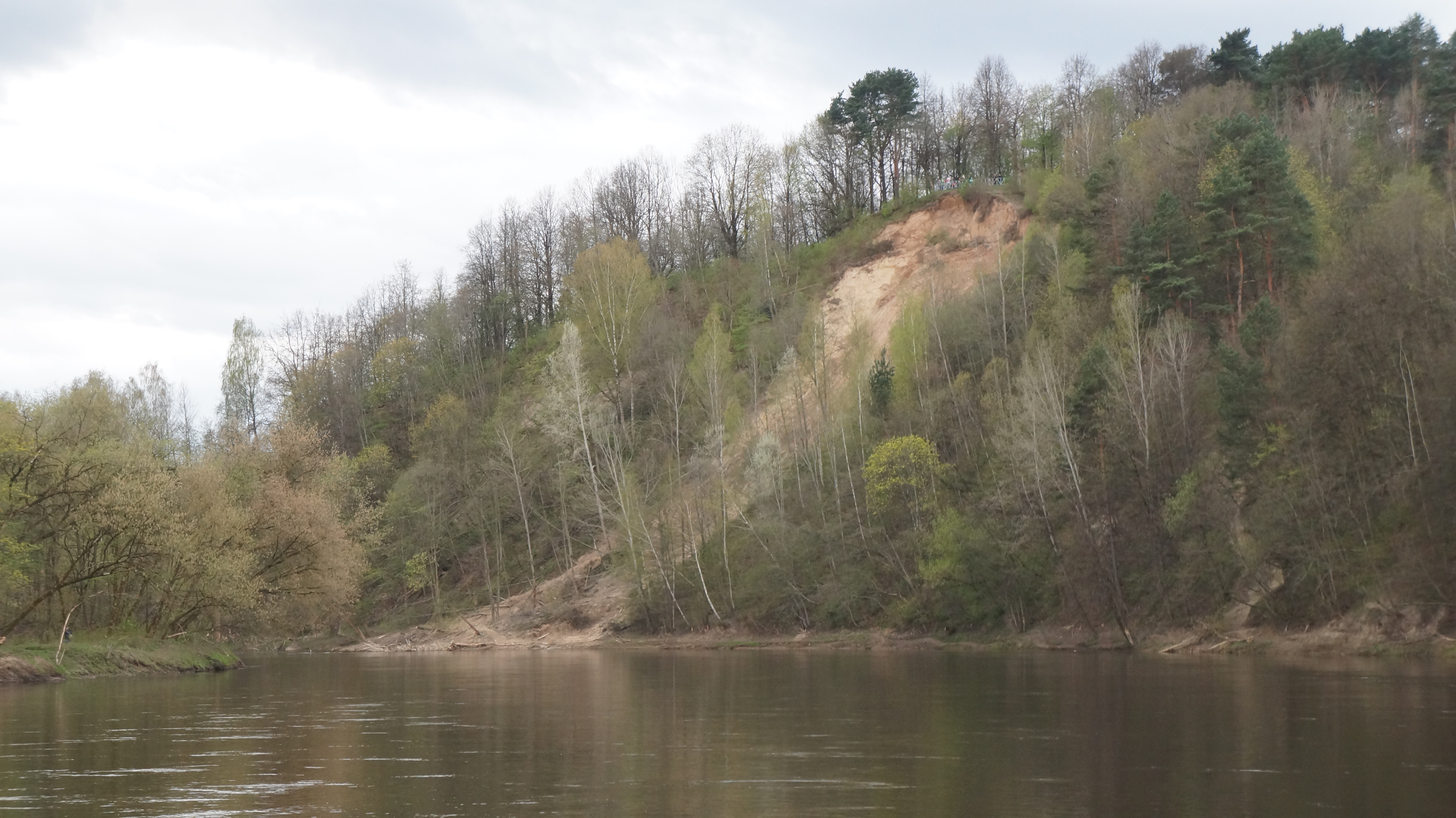 2017 Plikakalnyje įvyko nuošliaužą, nuotraukoje matomos jos pasekmės.